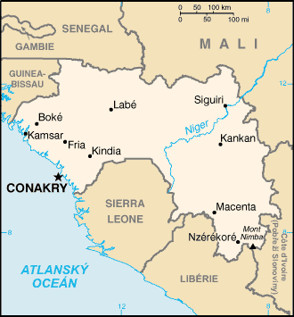 Mapa Guineje - přeložená mapa z CIA World Factbook.